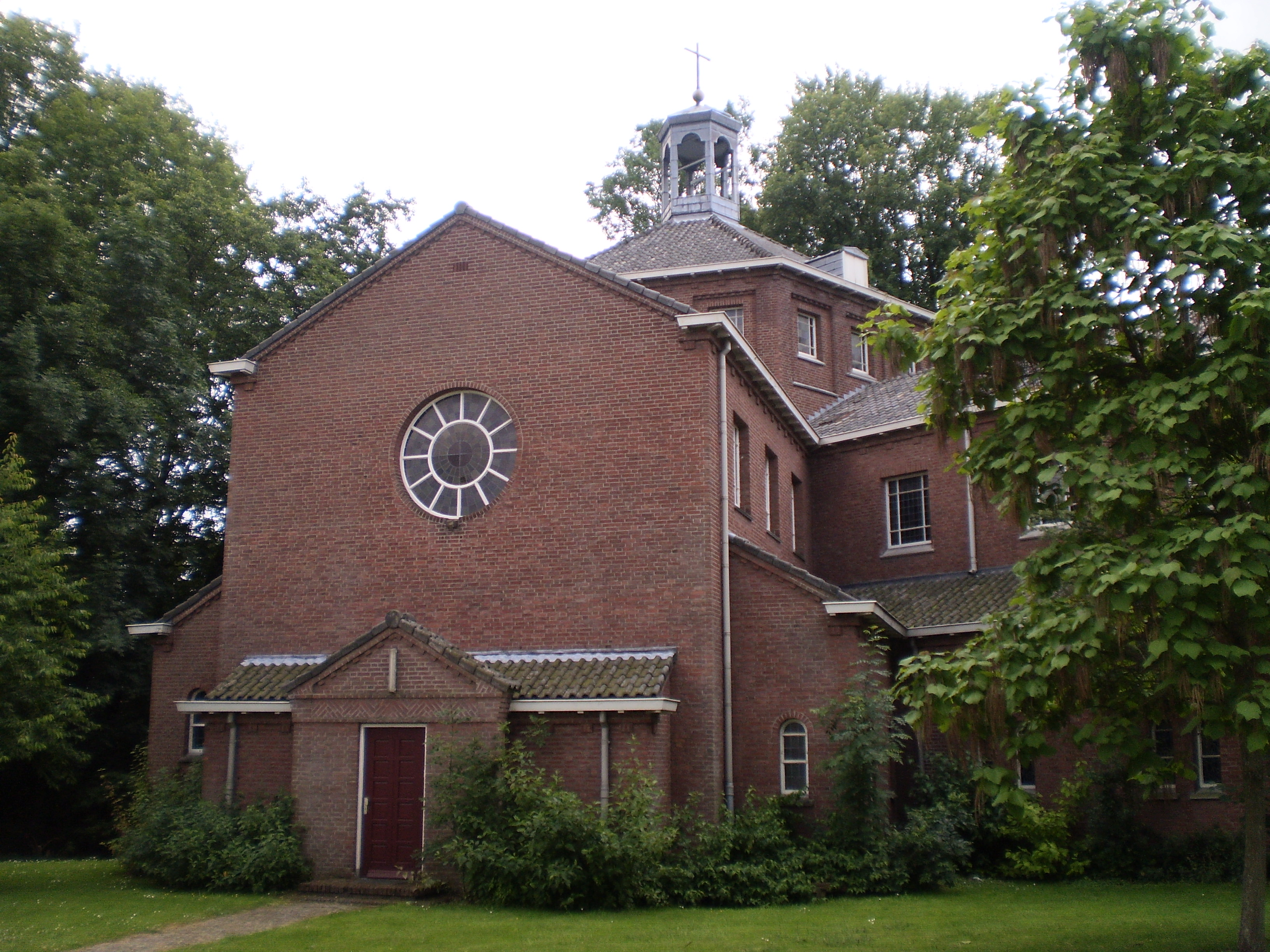 Kapel fan kleaster Larenstein